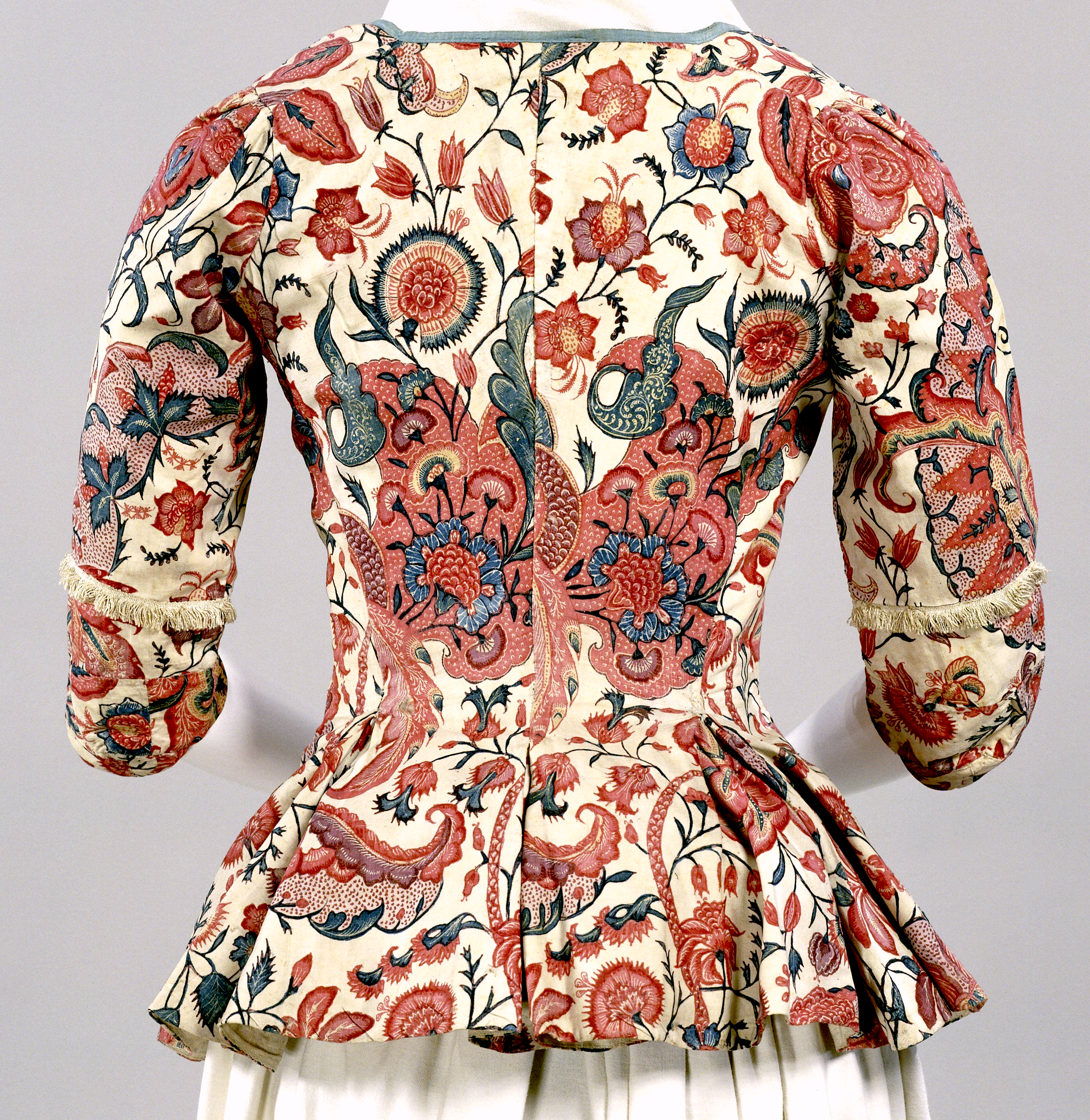 Jak met vierkante hals, (van sits) met grote, grillig gevormde bladornamenten en kleine anjerachtige bloemen; mouw met franje boven de elleboog, anoniem, ca. 1740 - ca. 1760